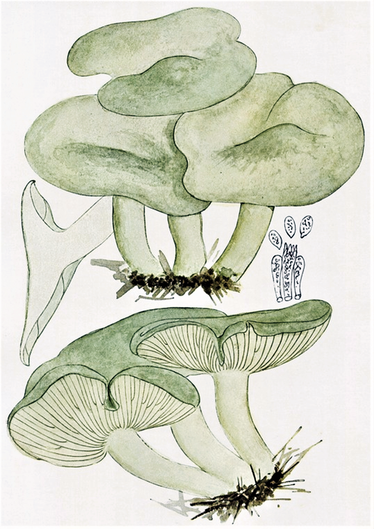 Giacomo Bresadola: Clitocybe virens (Scop., 1772) Sacc. (1887), heute Clitocybe odora (Bull., 1784) P.Kumm. (1871)